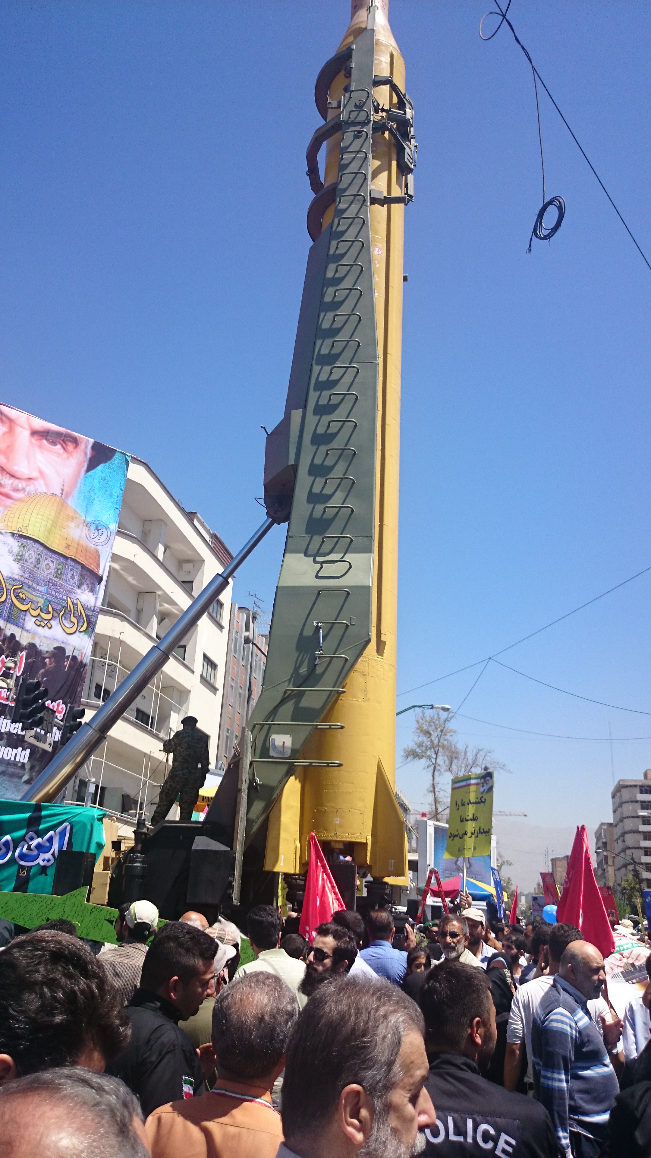 موشک شهاب - راهپیمایی روز قدس 96